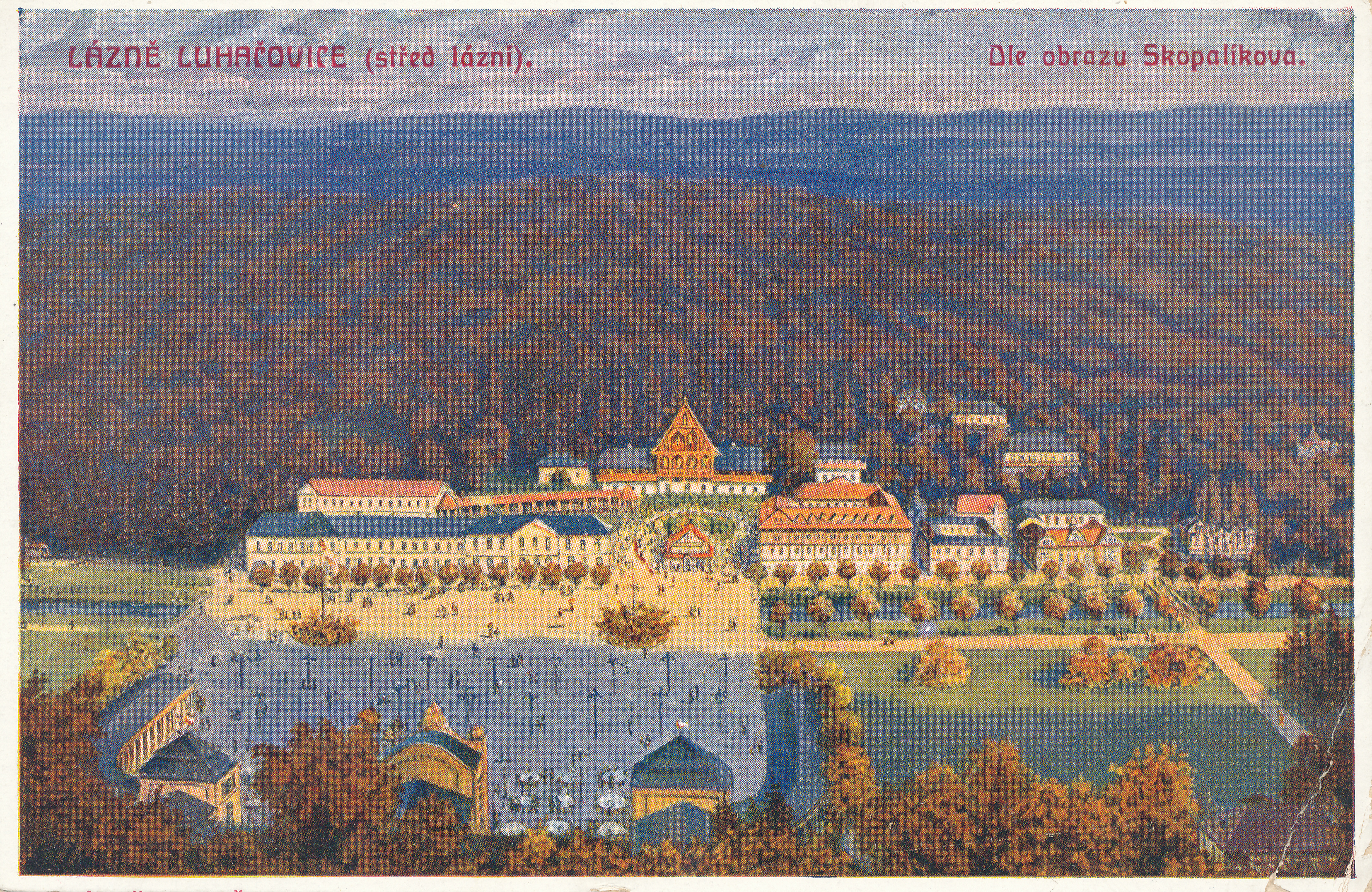 Lázně Luhačovice (střed lázní). Dle obrazu Skopalíkova, Štenc Praha. Prošlá poštou po roce 1908